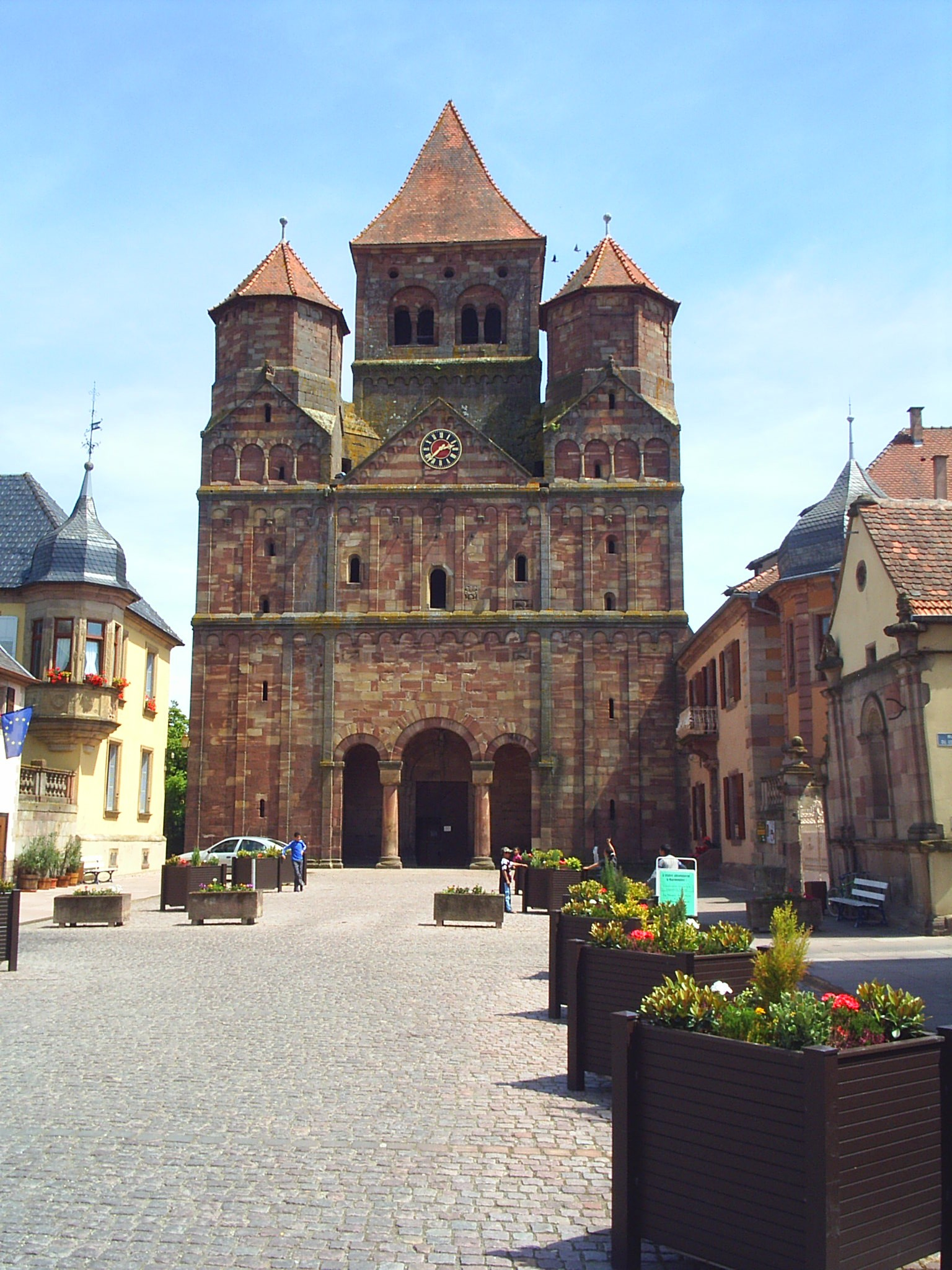 Façade romane de l'abbatiale de Marmoutier.